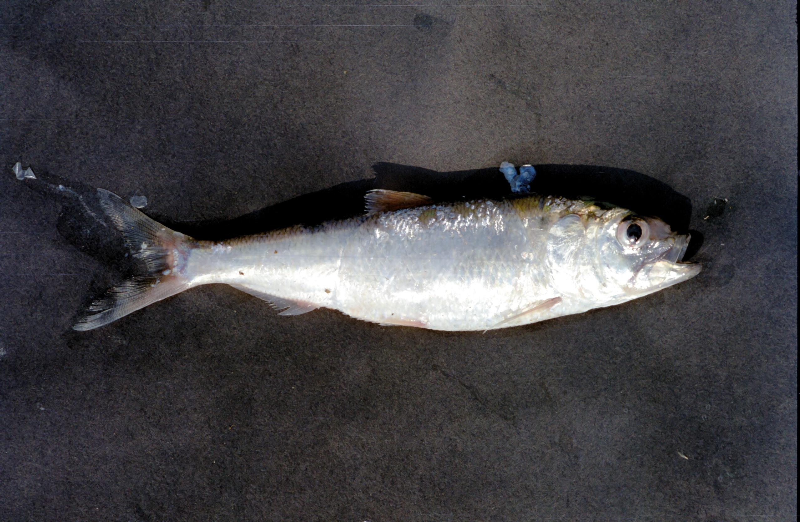 Alosa macedonica